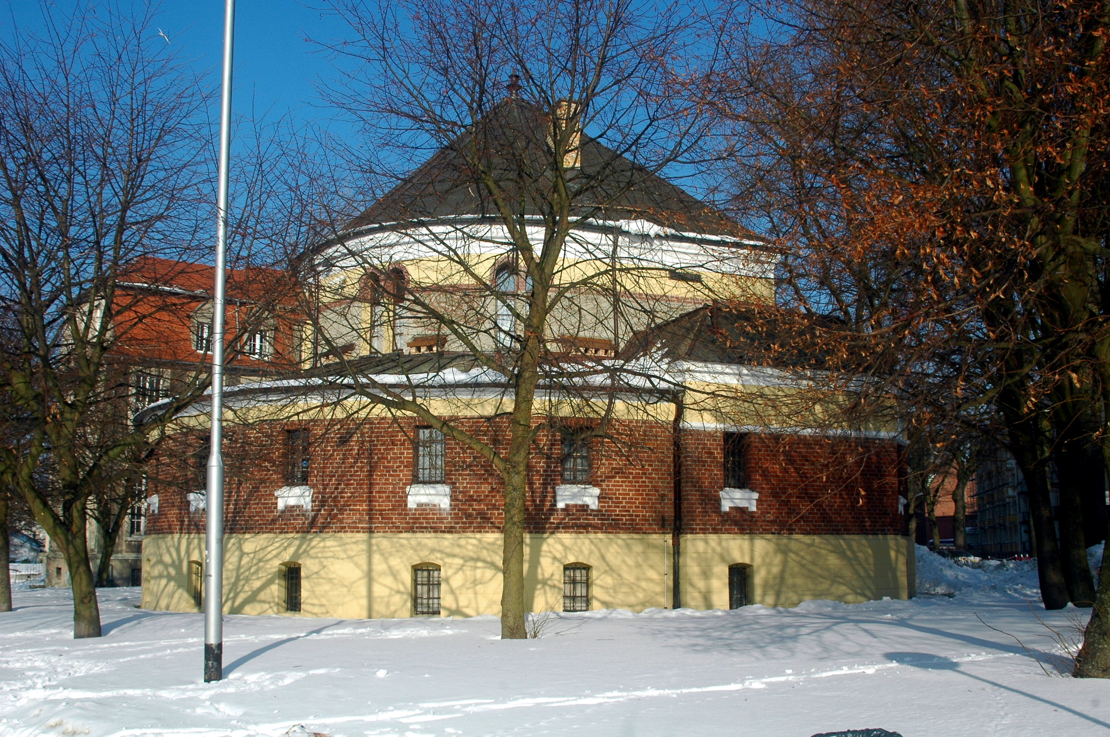 Państwowa Szkoła Muzyczna I Stopnia w Kołobrzegu - ulica Jana Frankowskiego 1.